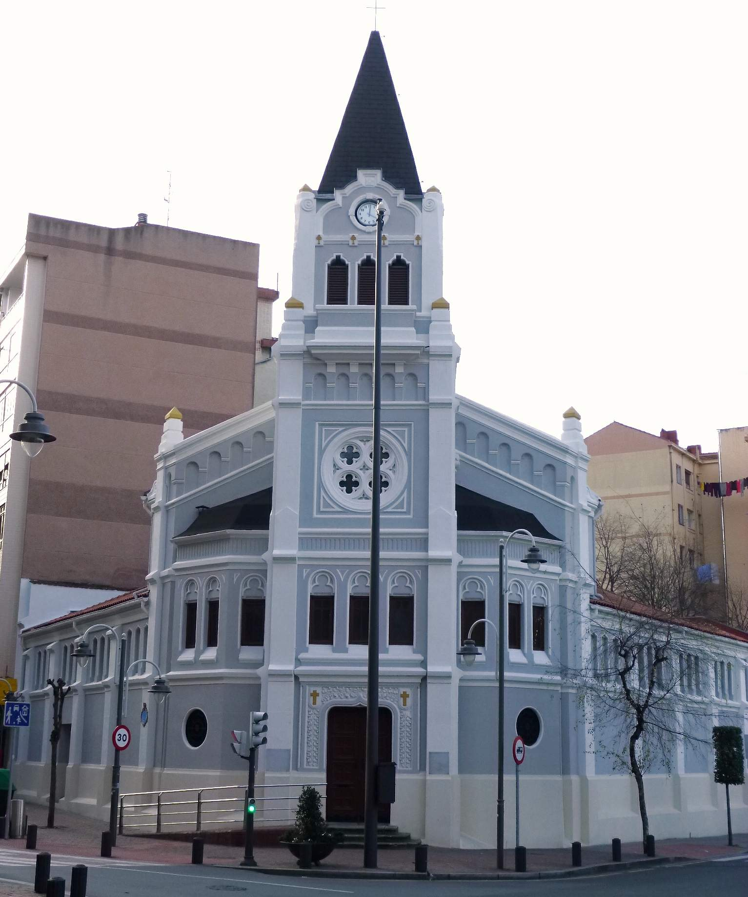 Iglesia de Nuestra Señora de la Medalla Milagrosa, en el barrio de Zorrotza (Bilbao)